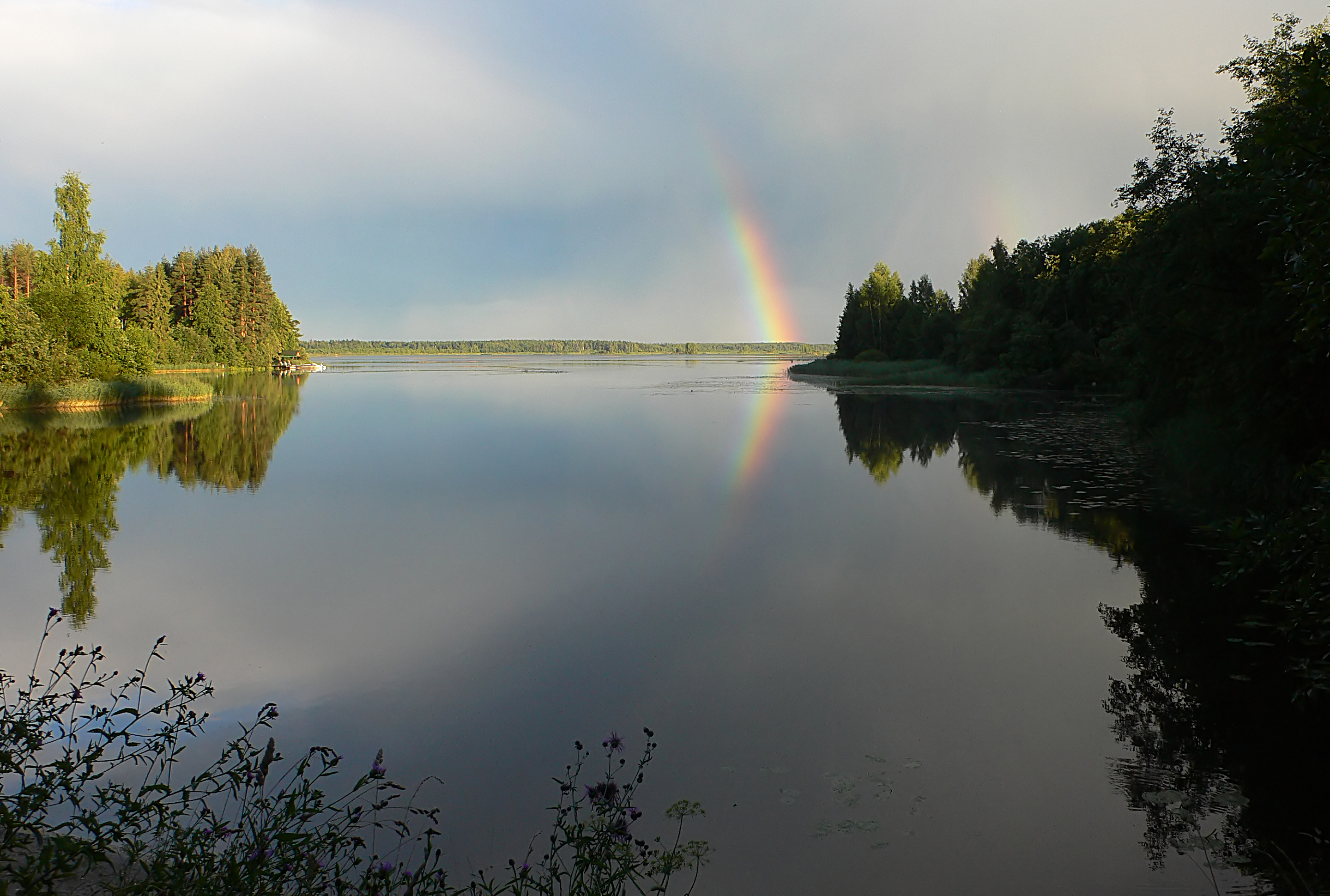 Кубрь